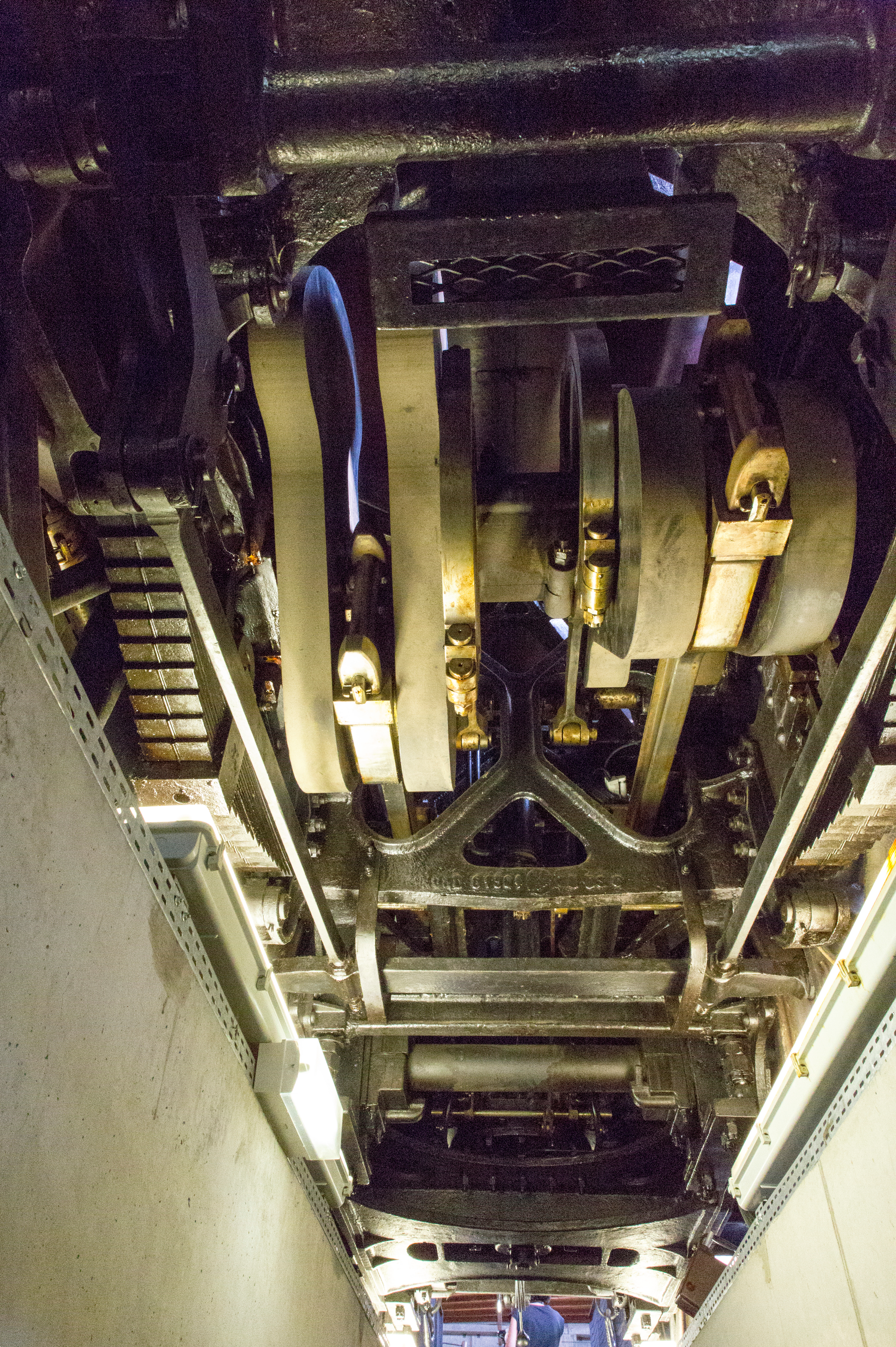 Vue de dessous d'une locomotive compound avec ses bielles internes.